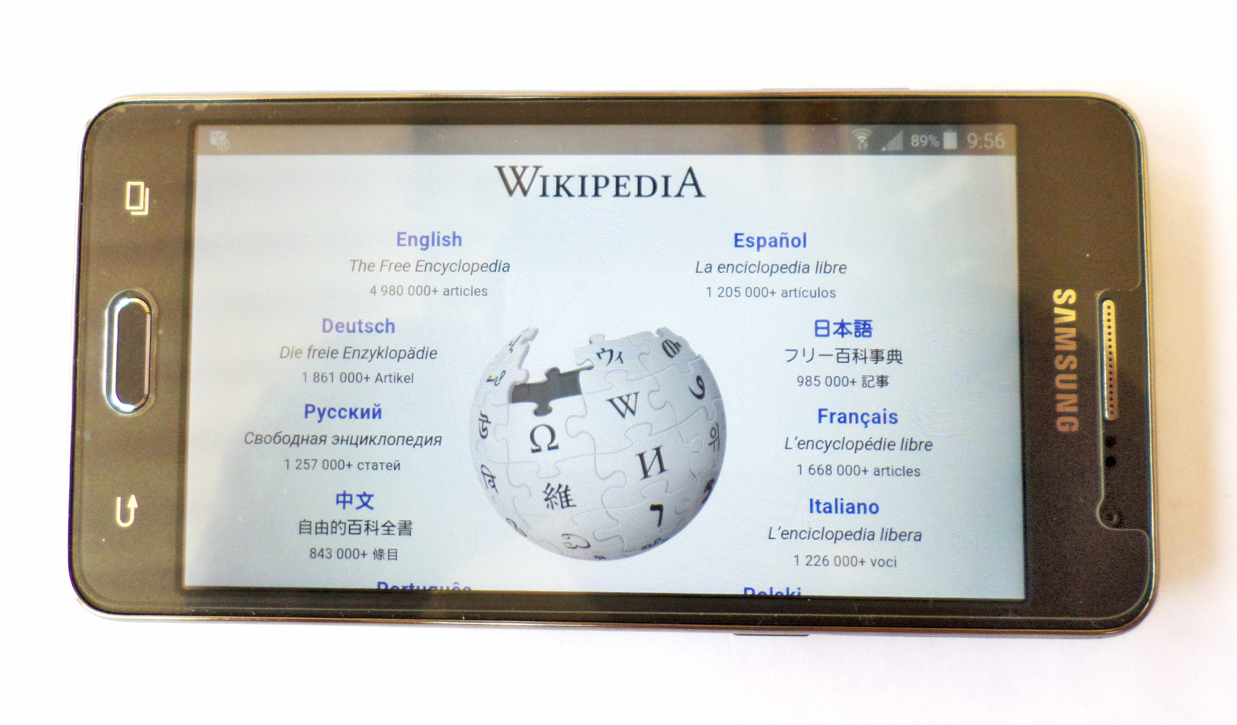 Telefono Samsung galaxy grand prime mostrando Inicio en Wikipedia